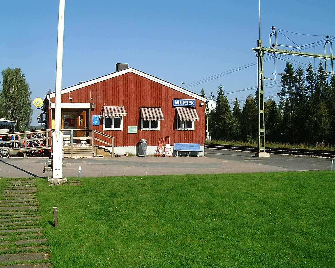 Järnvägsstationen i Murjek